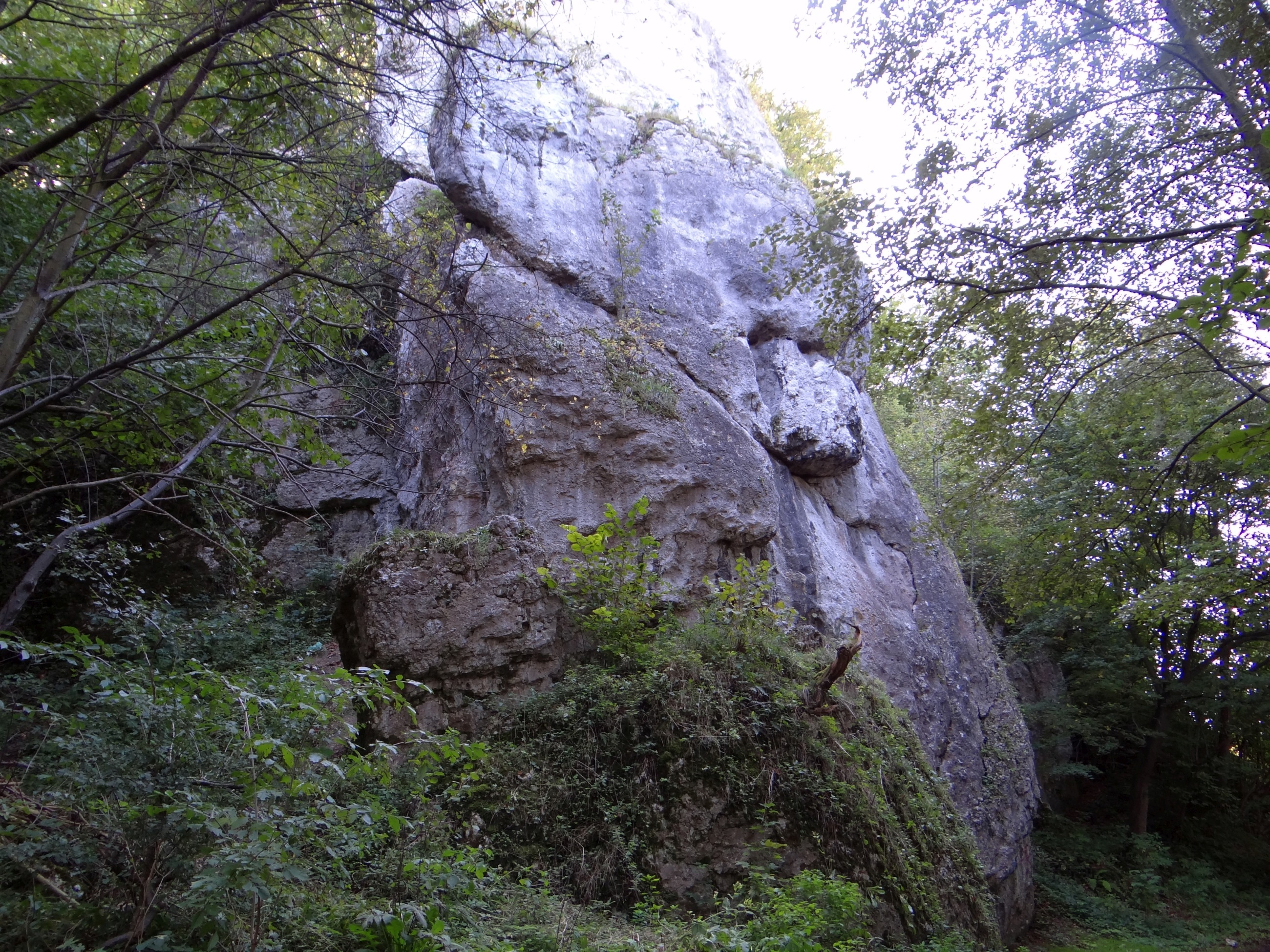 Gaudynowska Baszta w Dolinie Brodłówki